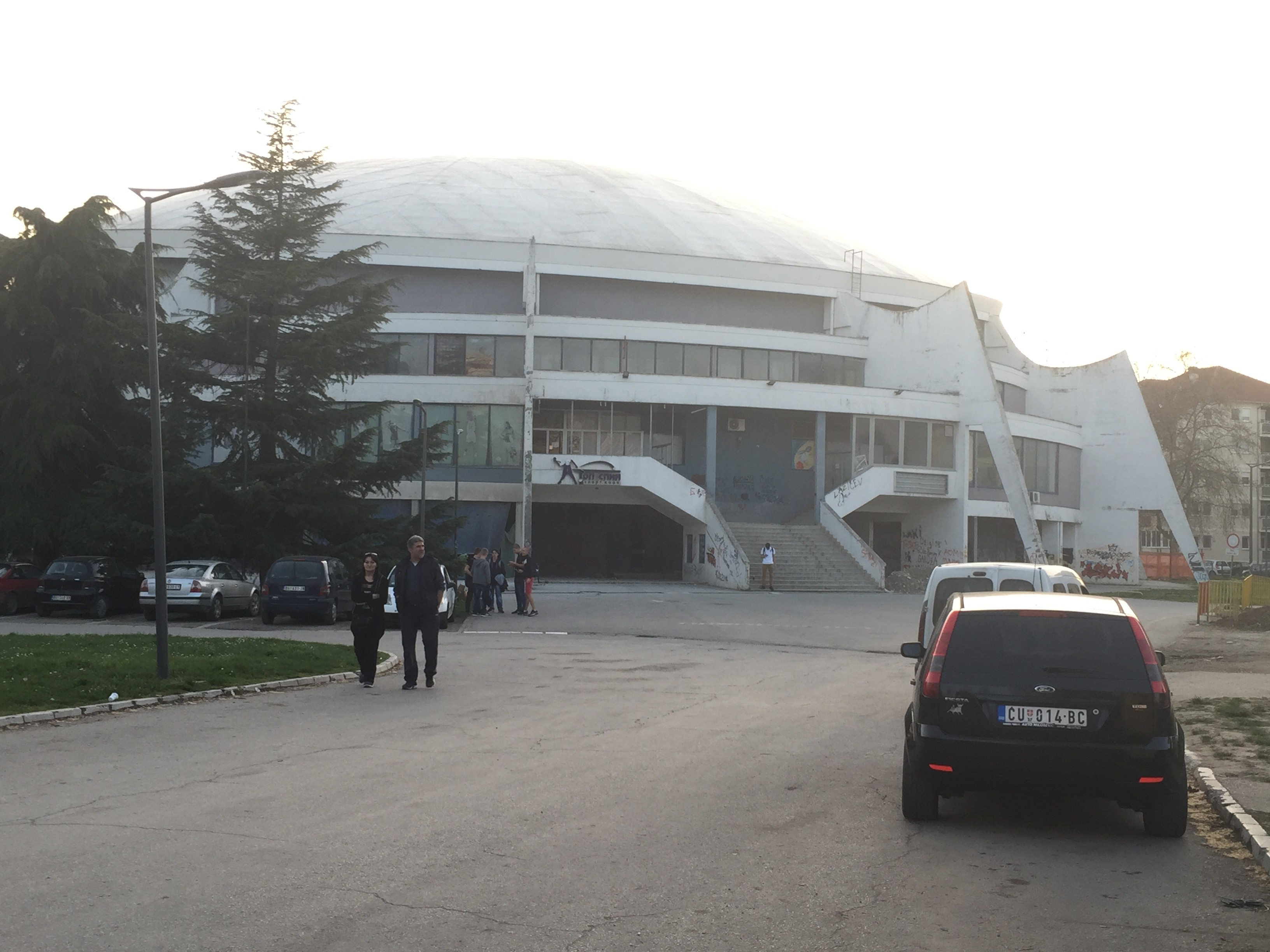 Dom kulture Obrenovac